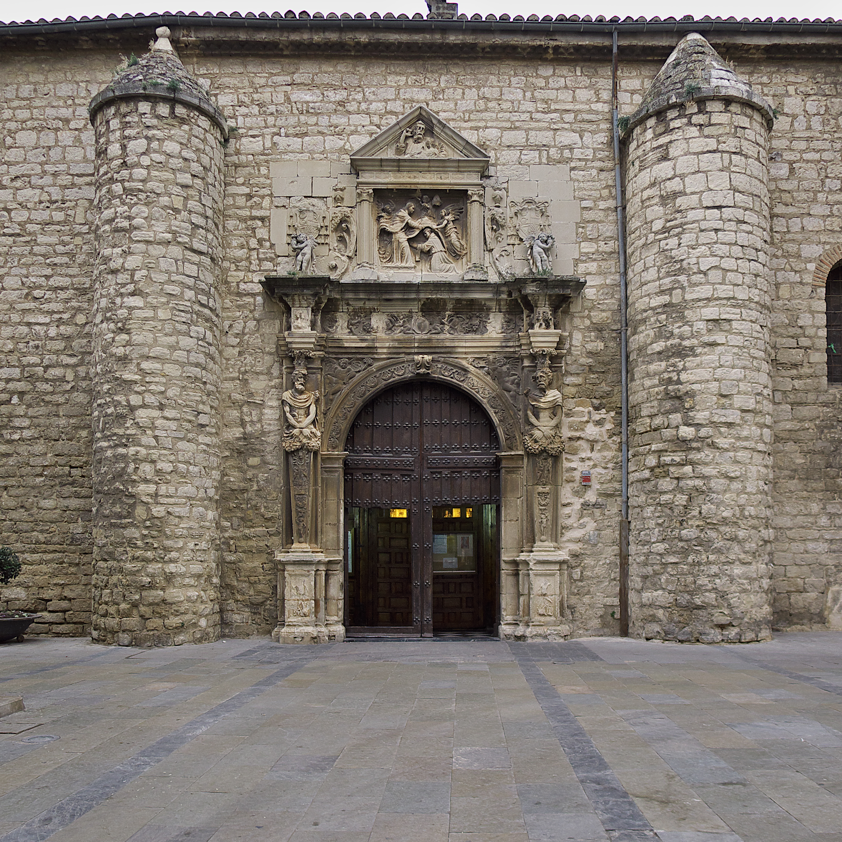 Portada situada en la nave del Evangelio, muro septentrional. Promovida por el obispo de Jaén, Pedro Pacheco Ladrón de Guevara (1545-1554) y proyectada por Andrés de Vandelvira